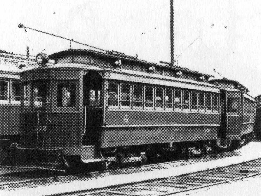 1940年ごろに撮影された広島瓦斯電軌（広島電鉄）の300形電車302号。